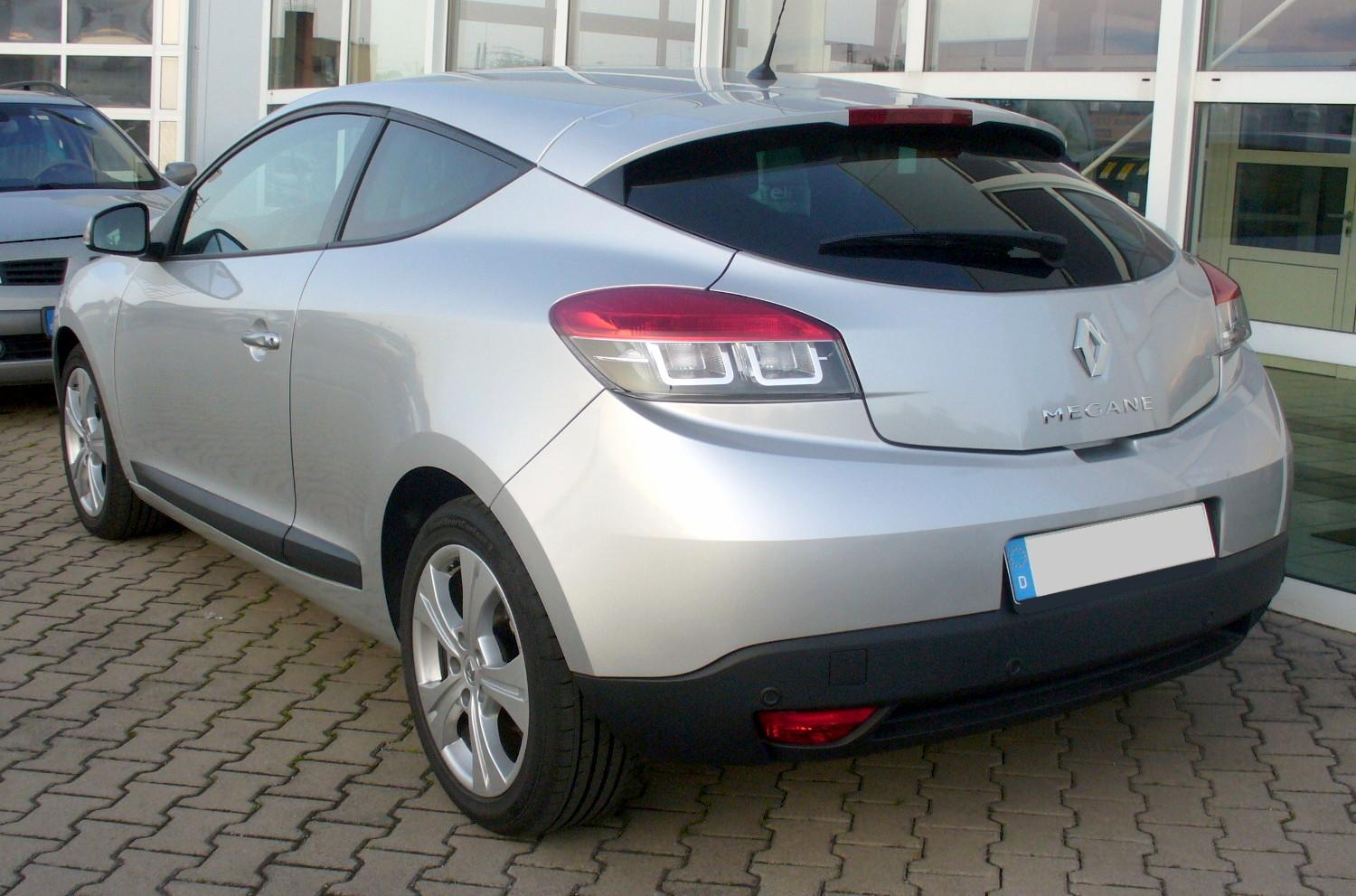 Renault Mégane III Coupé